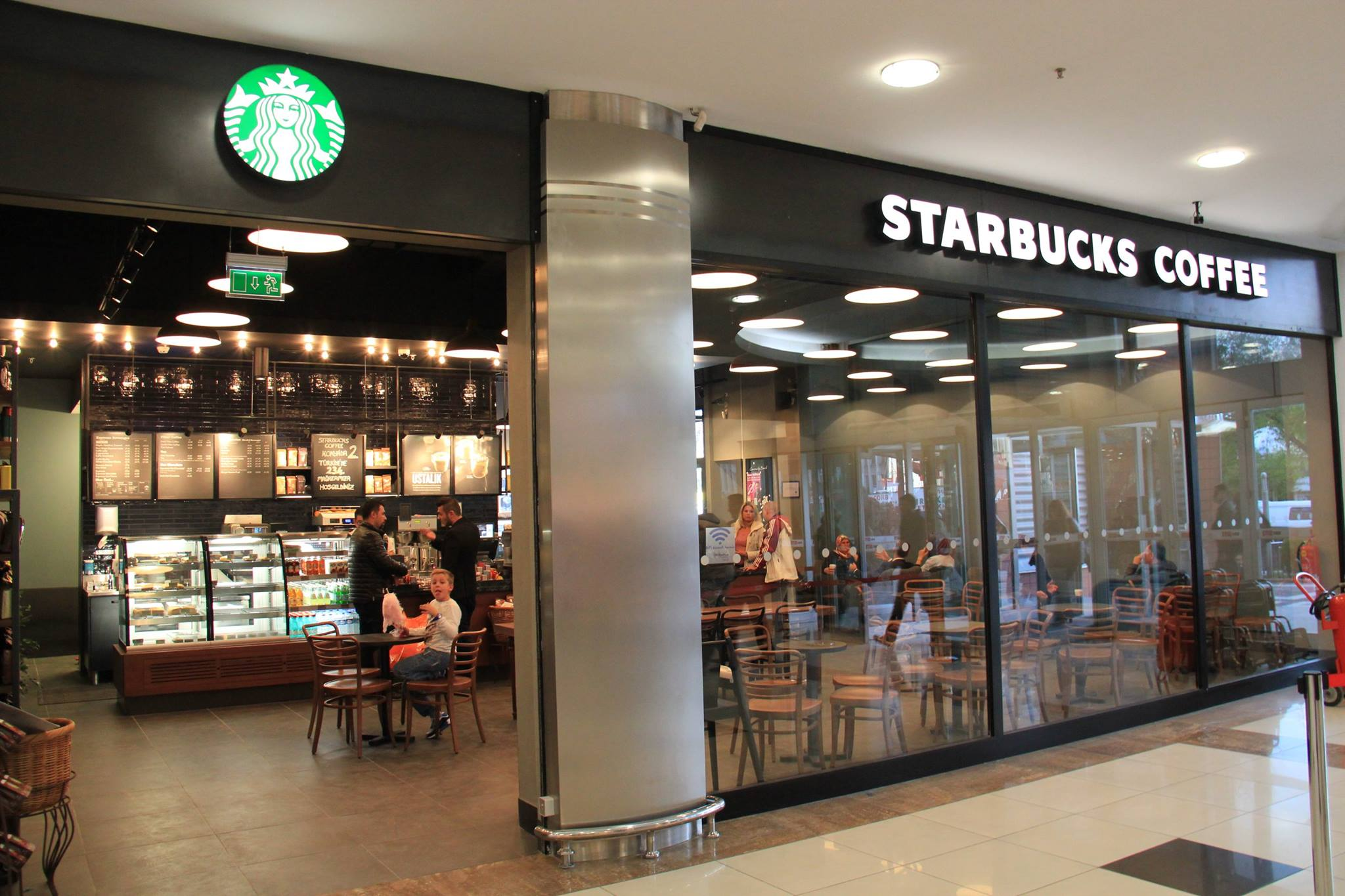 Konya SBUX